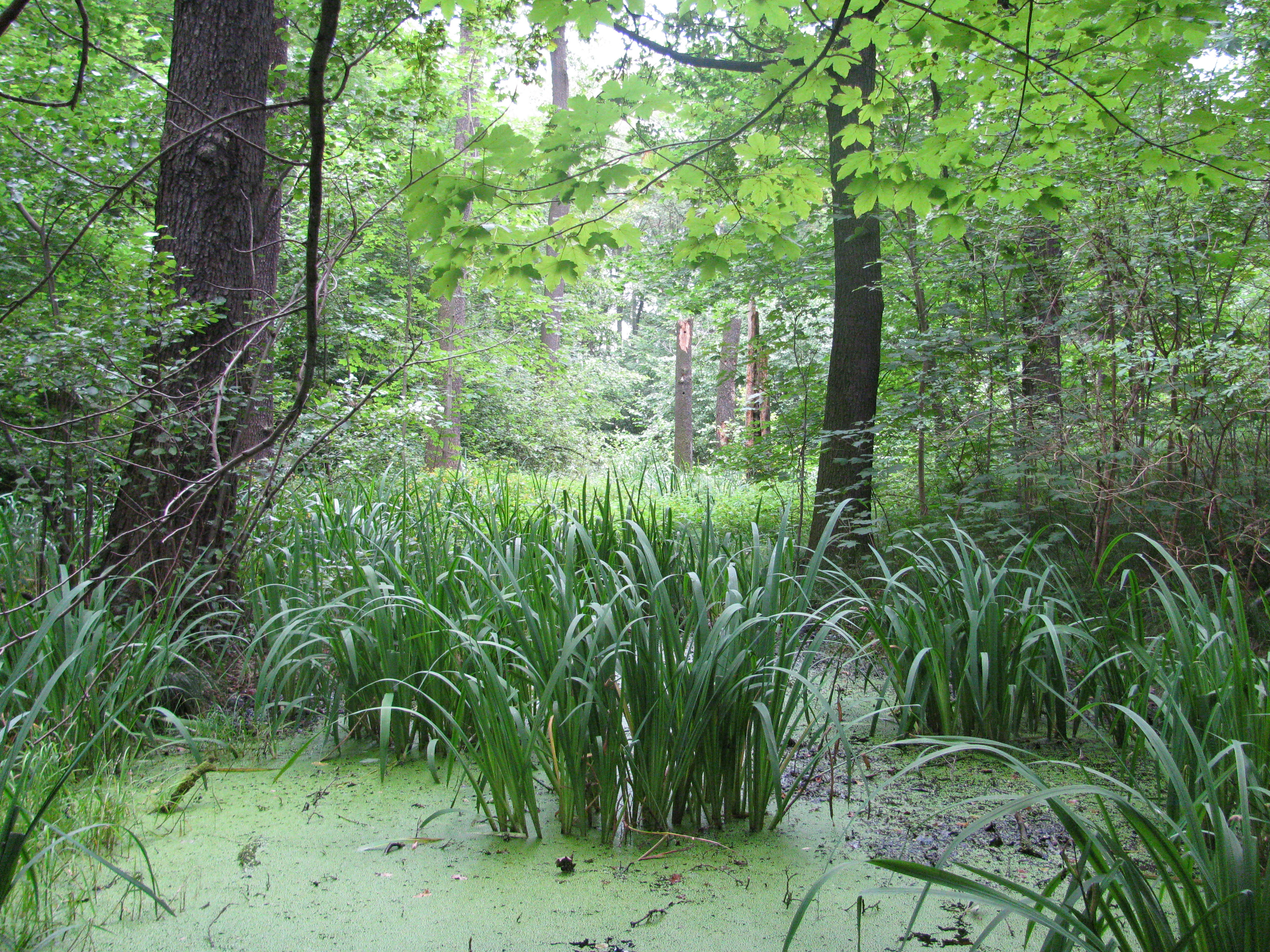 "Altes Mool" in Steinbach, Gemeinde Moritzburg, Sachsen. Standort einer früheren Wasserburg. Versumpfender Bereich zwischen dem ehemaligen Burgwall und der Anhöhe in der Mitte, dem eigentlichen Standort der Burg.